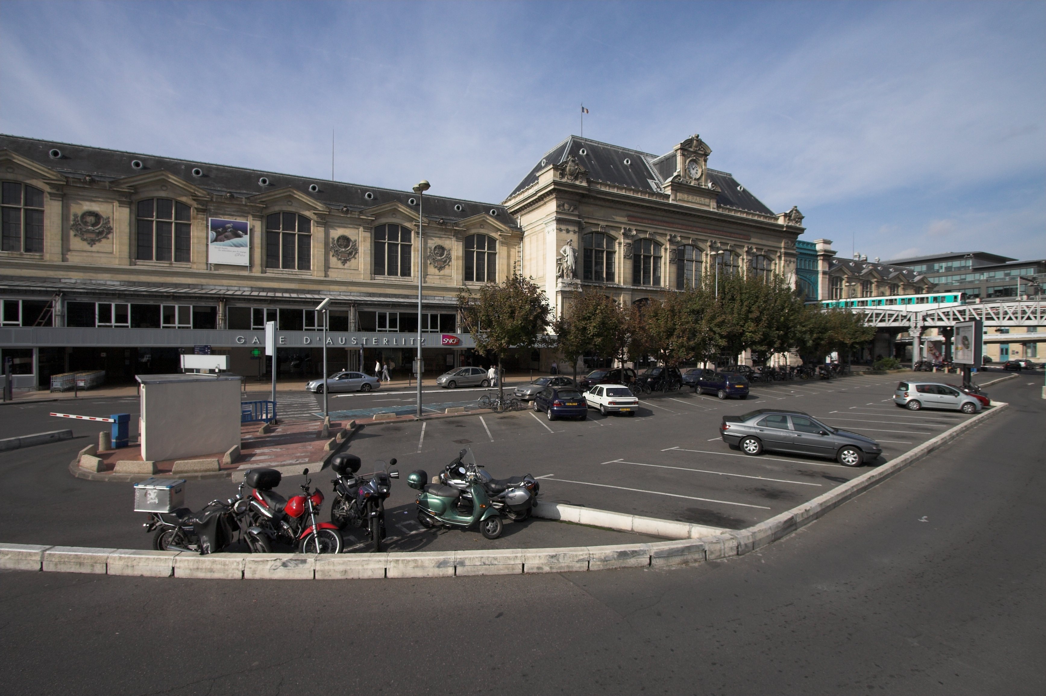 Gare d'Austerlitz(Paris, France)